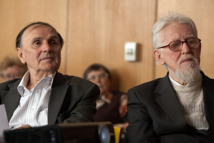 Андрей Анатольевич Зализняк и Владимир Антонович Дыбо на Заседании, посвященном 80-летнему юбилею В. А. Дыбо (Москва, РГГУ, 05.05.2011).